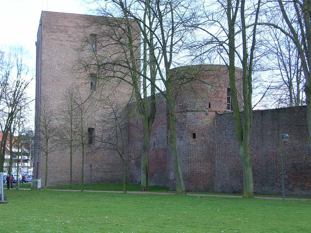 Erkelenzer Burg mit rundem Wehrturm